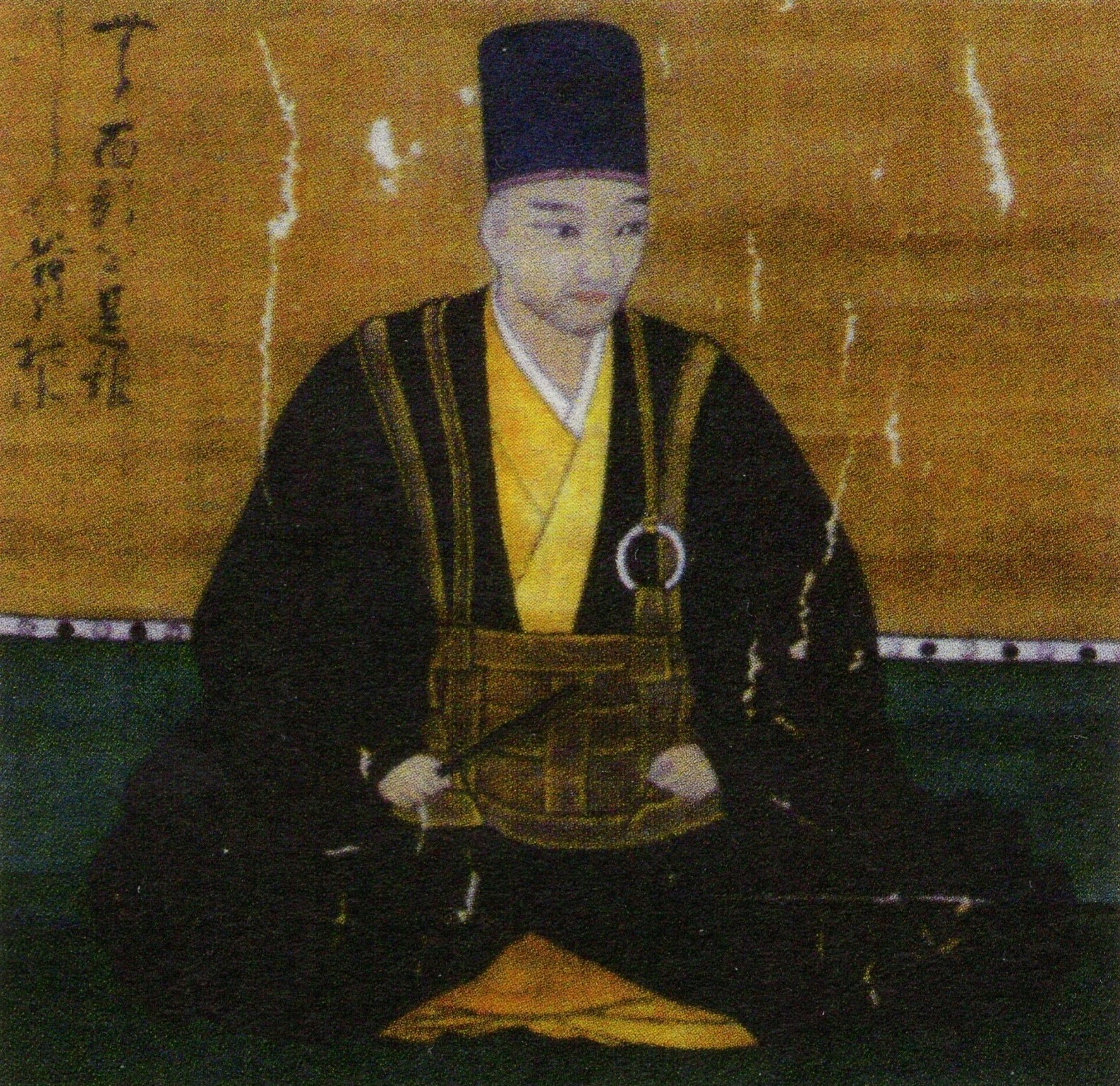 関一政の肖像。